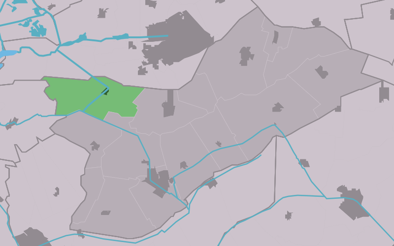 Kaartsje fan himrik fan Nij Beets